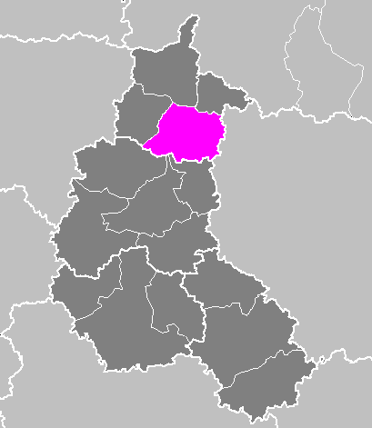 Maps of arrondissements and cantons of France: Arrondissement de Vouziers.PNG